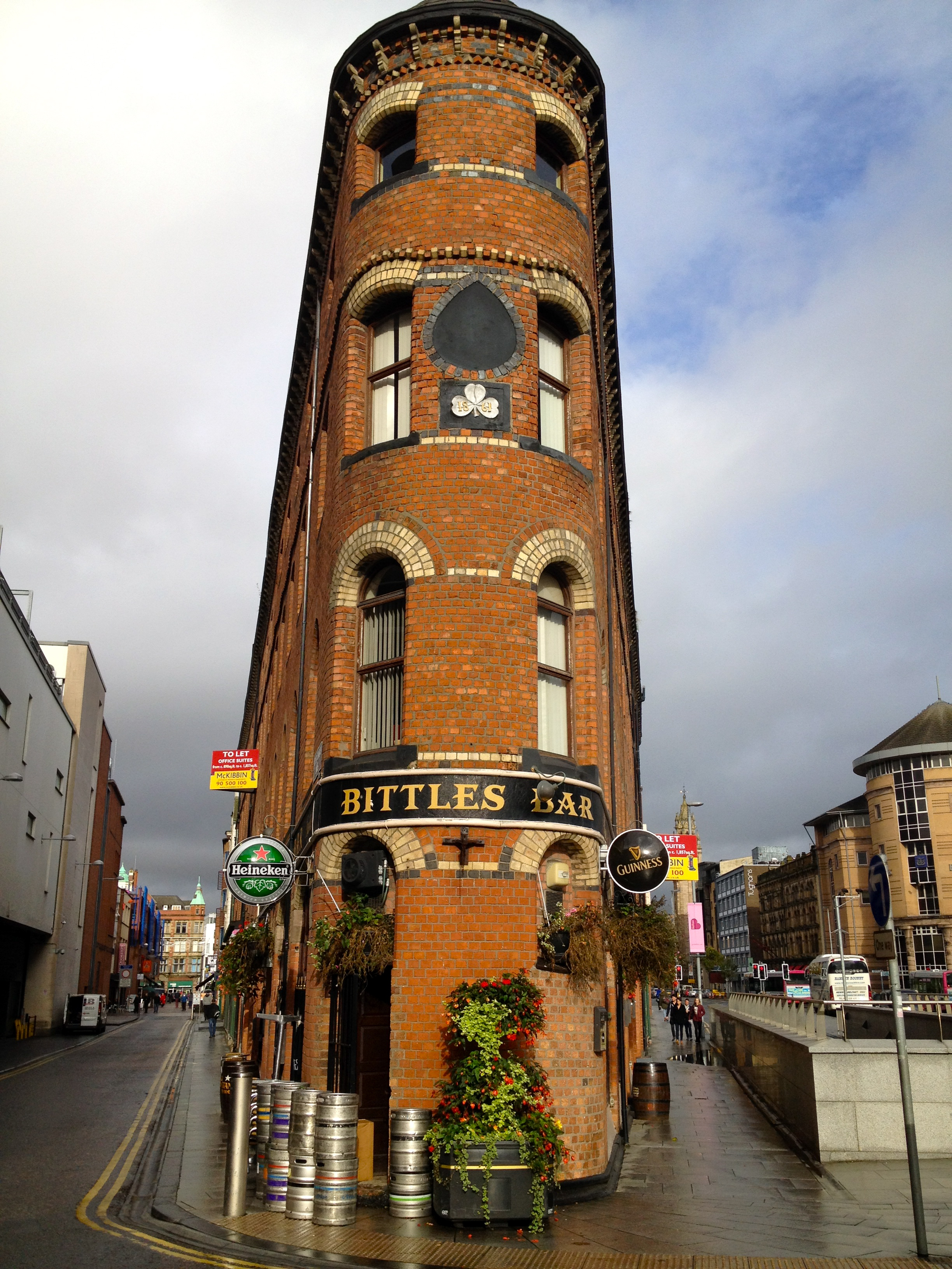 Belfast, UK